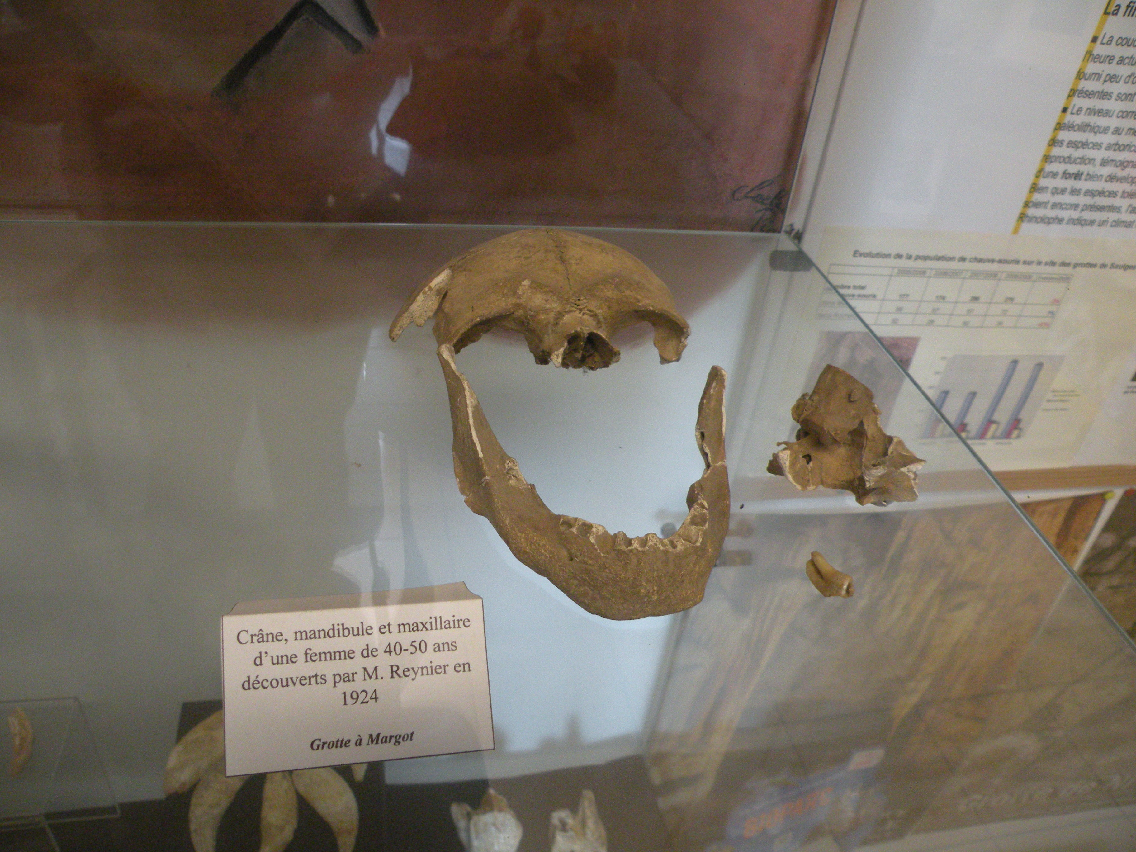 vu sur le domaine des Grottes et Canyon de Saulges crane trouvé dans la grotte margot